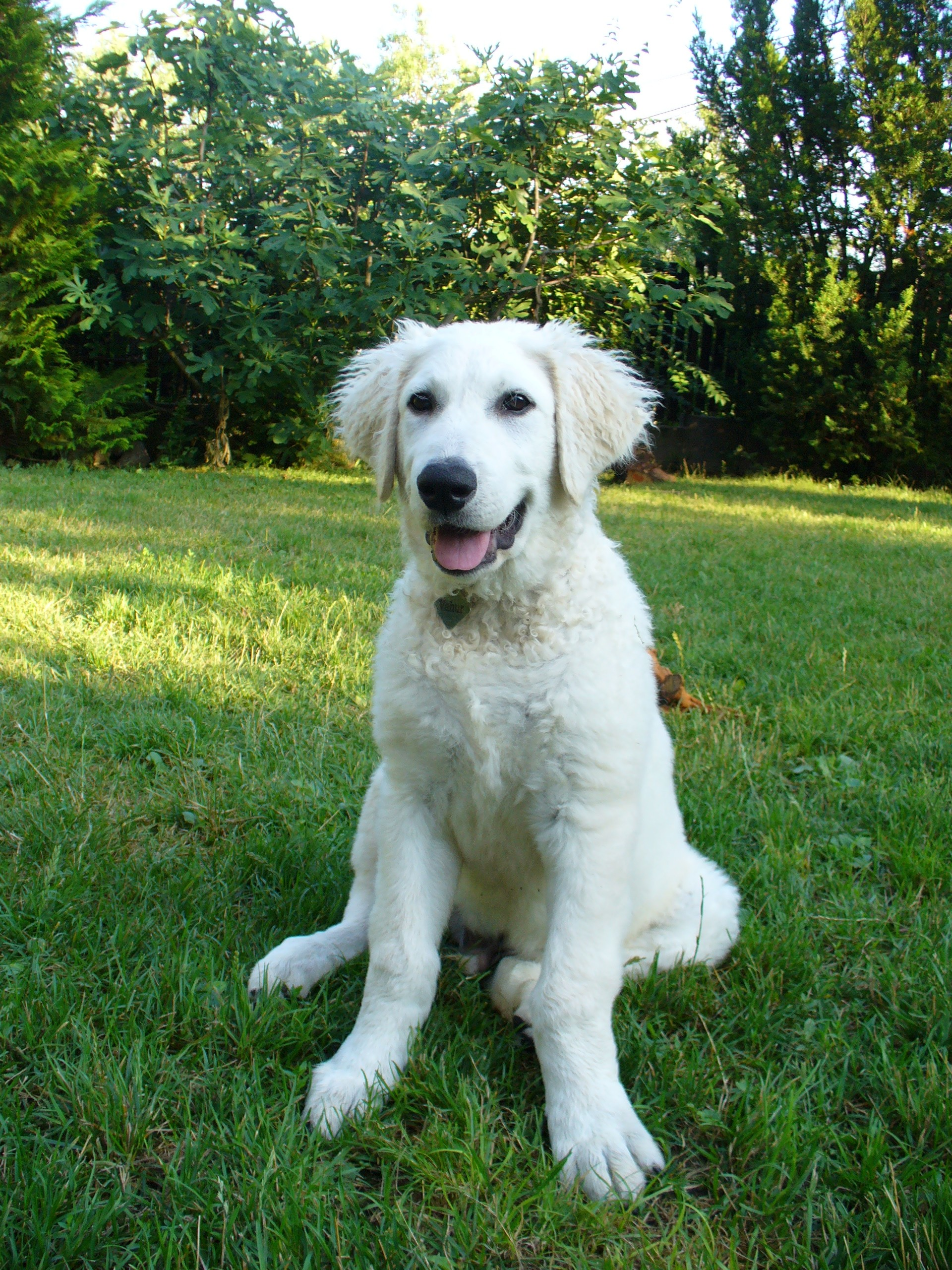 Négy hónapos kuvasz